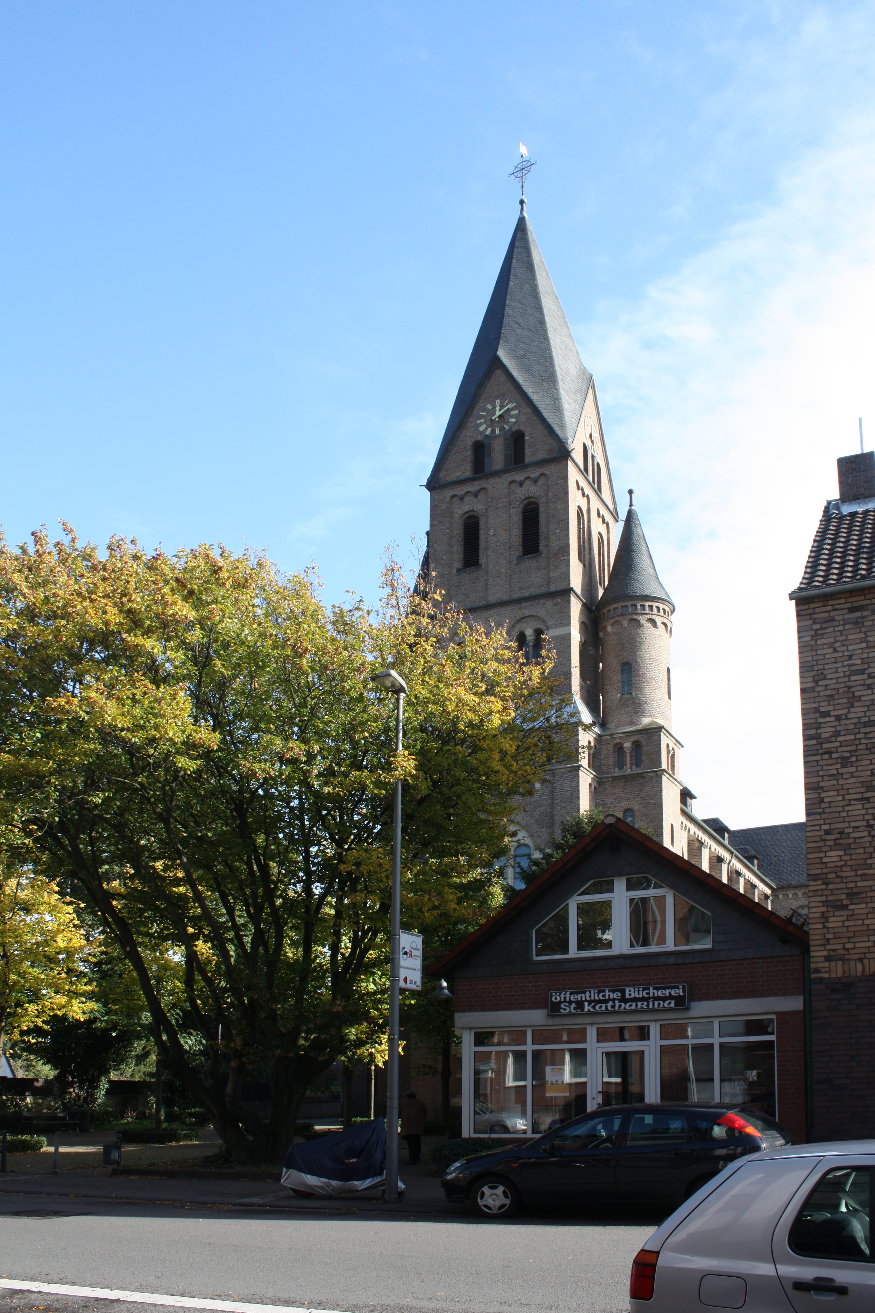 Köln-Niehl, Pfarrkirche Neu St. Katharina